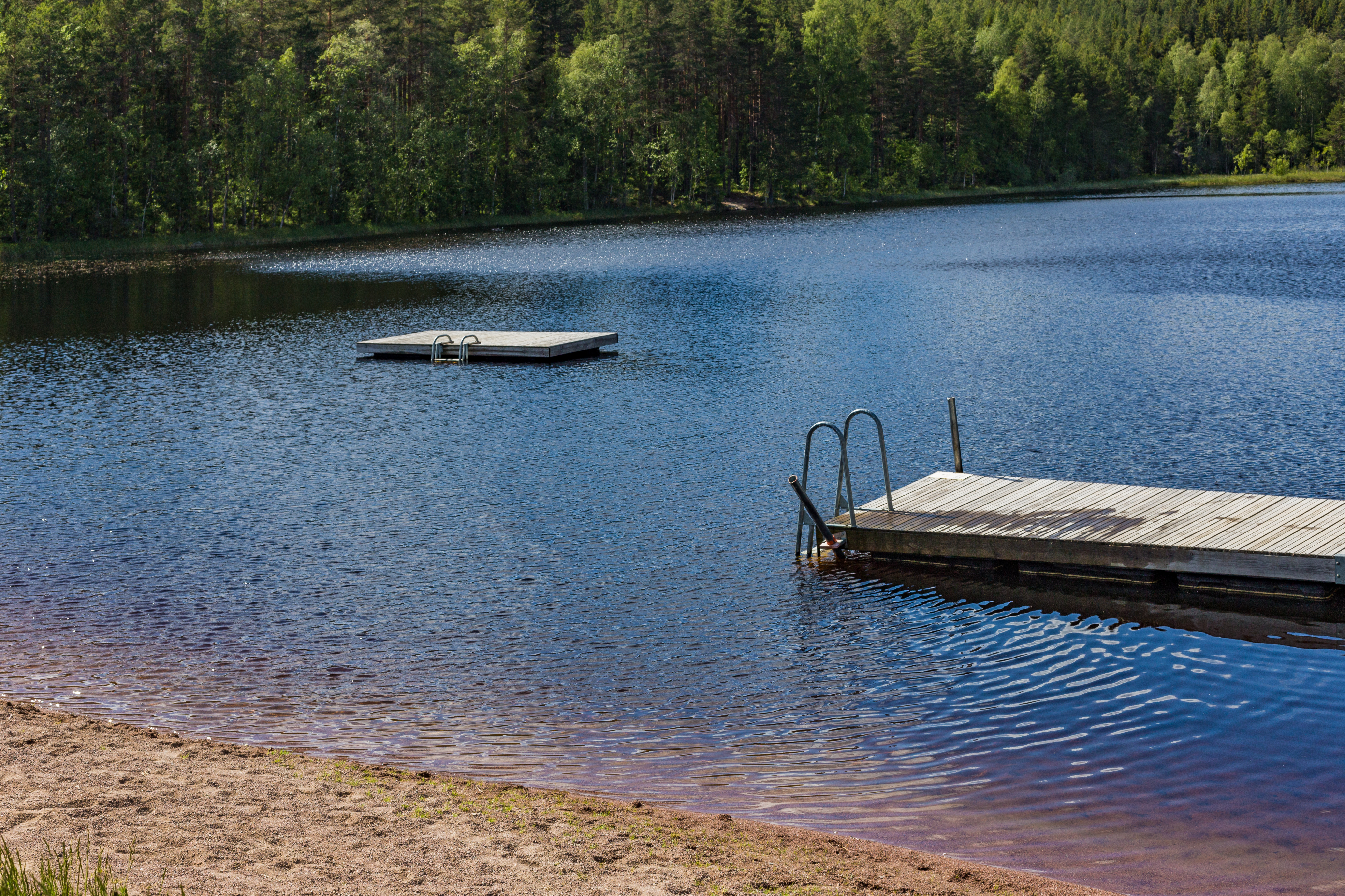 Kuppdammen (Kuppen), Garpenberg. Hedemora kommun, Dalarnas län, Sverige